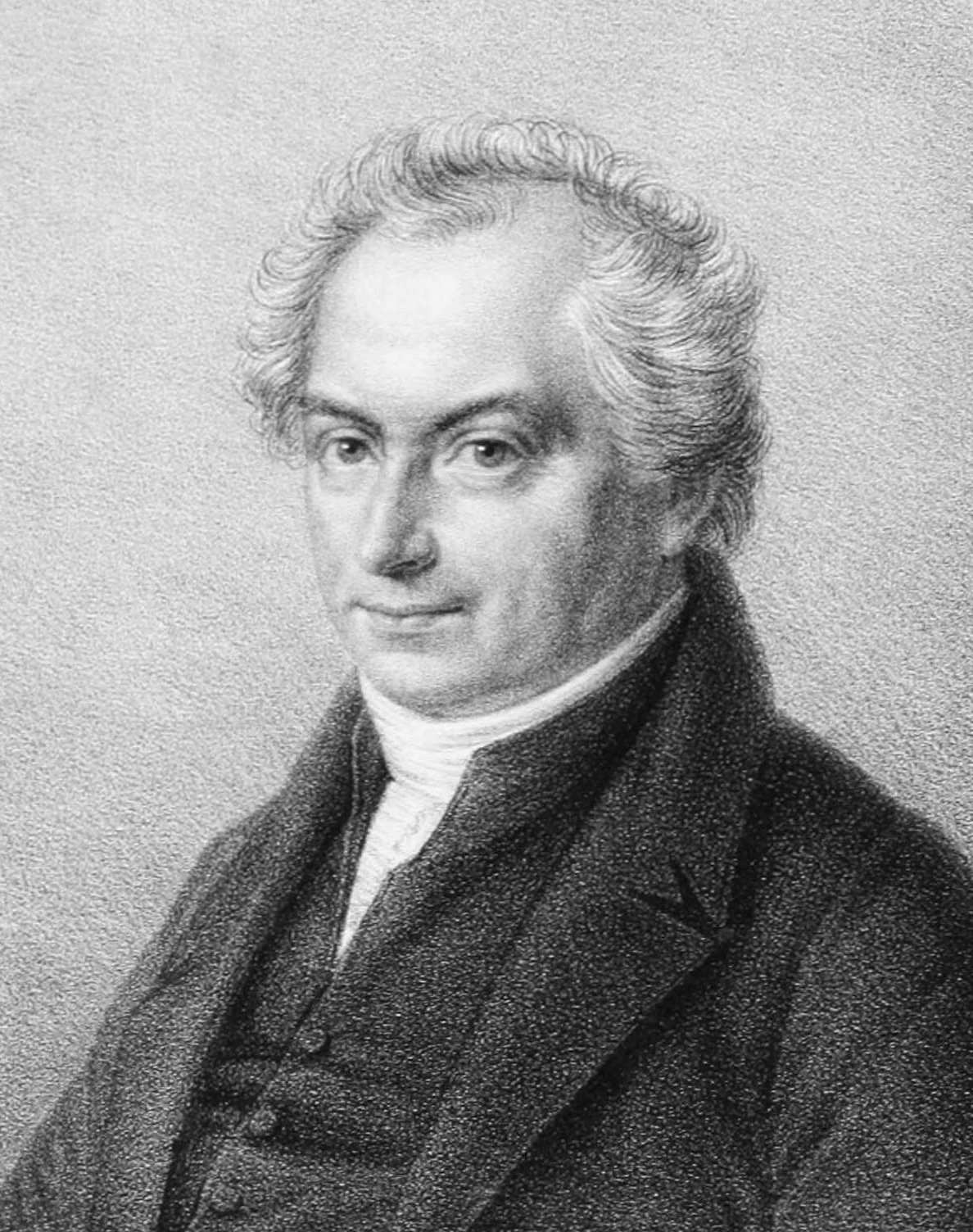 Porträt: Heinrich Wilhelm Olbers. In: Abhandlung über die leichteste und bequemste Methode die Bahn eines Cometen zu berechnen. Dritte Ausgabe, vermehrt mit einem Anhange, die Fortsetzung und Ergänzung des Cometen-Verzeichnisses bis zum Jahre 1864 enthaltend. Von J. G. Galle. Voigt & Günther, Leipzig 1864